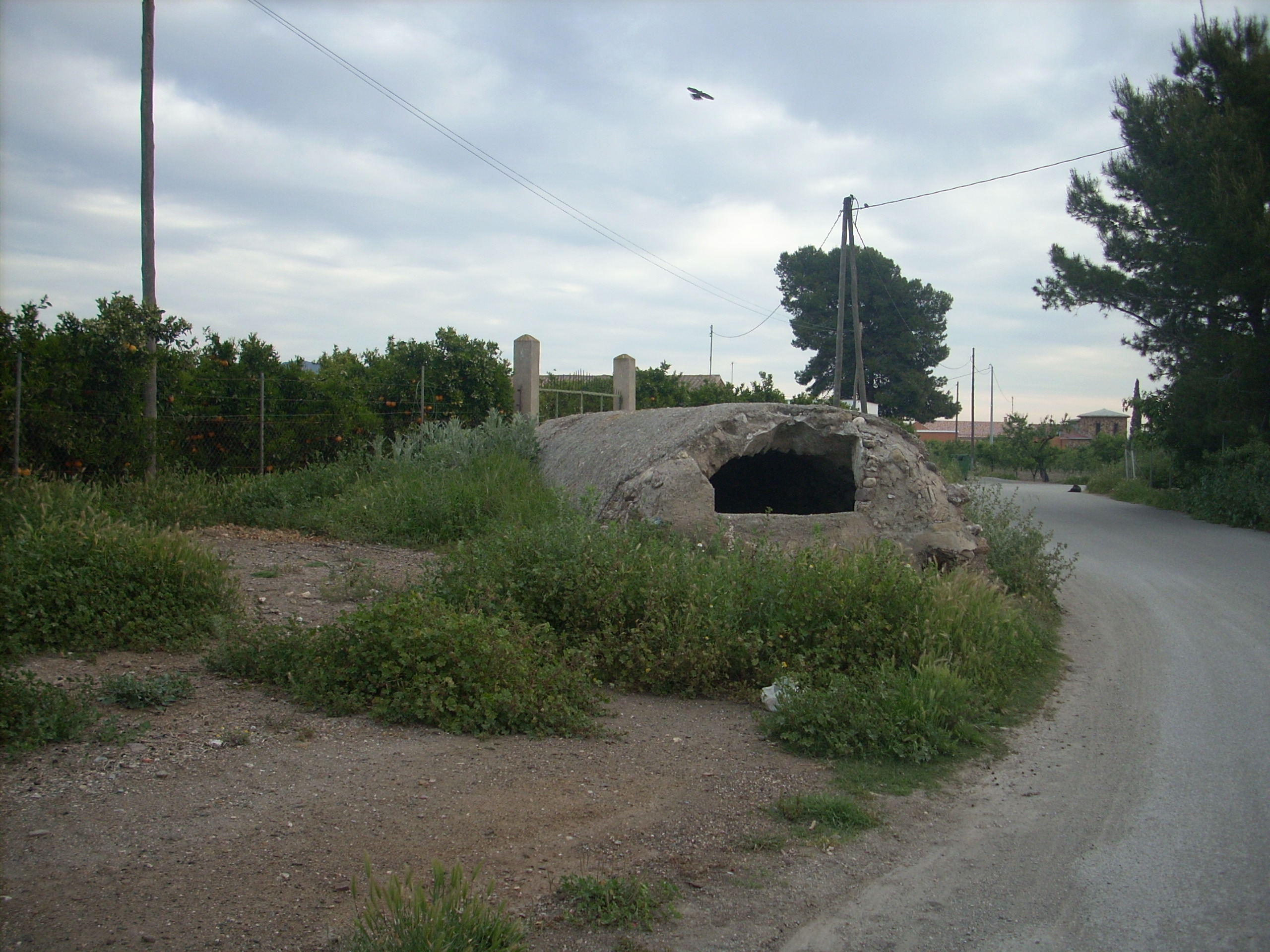 aljibe de época medieval islámica situado en las proximidades de la ermita de la pedanía de El Esparragal